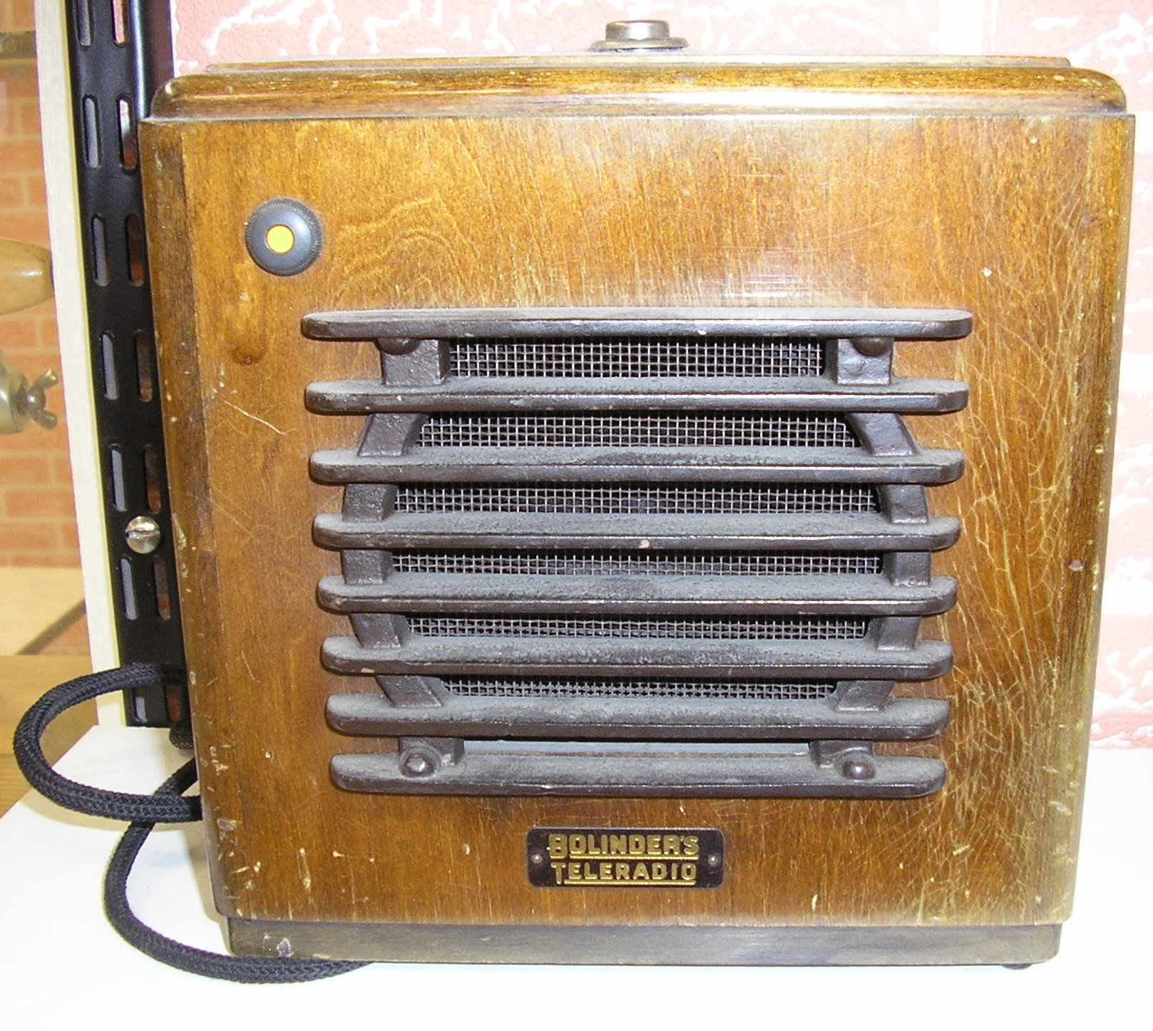 Bolinder's "Teleradio" intercom